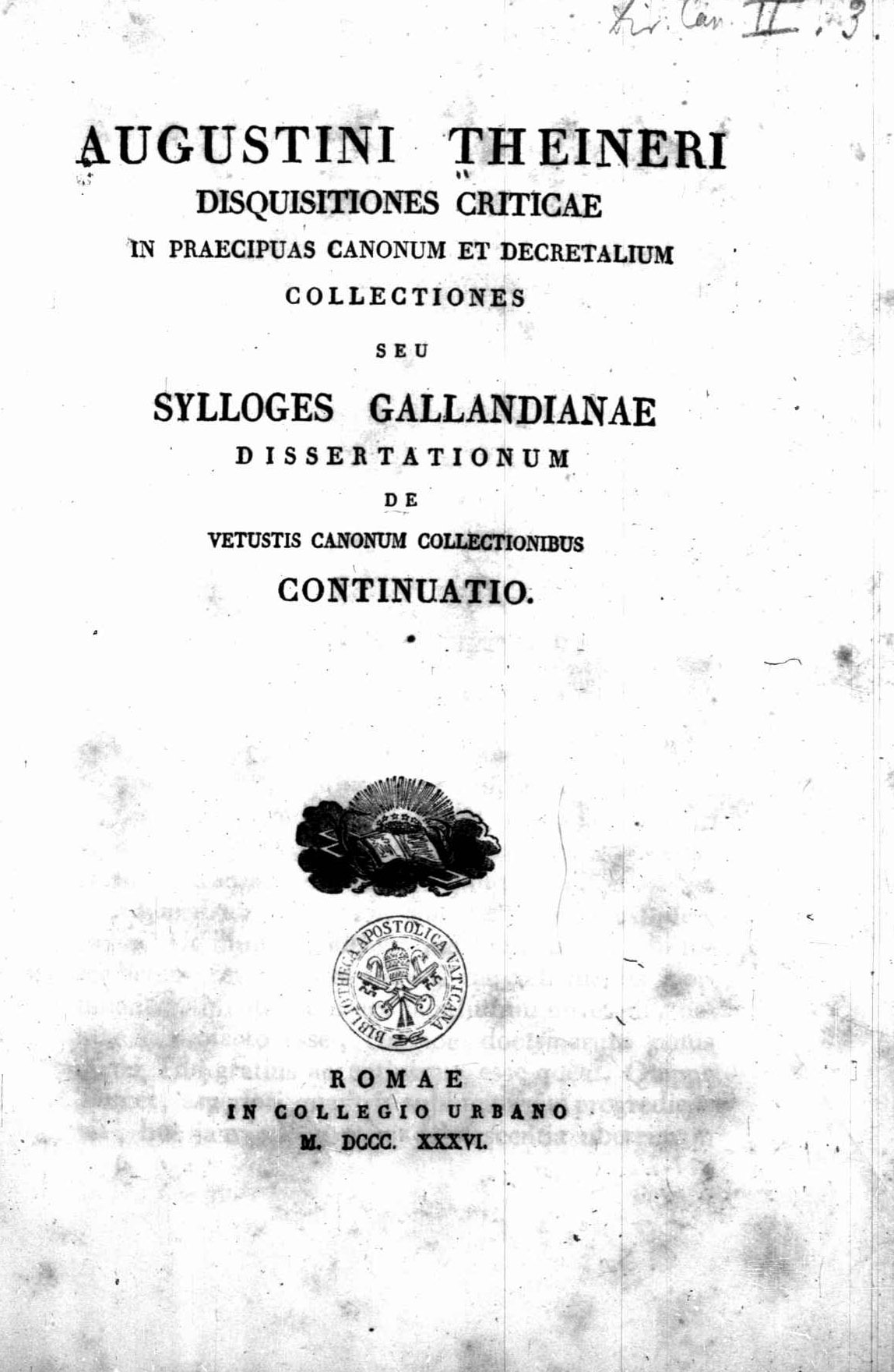 Frontespizio